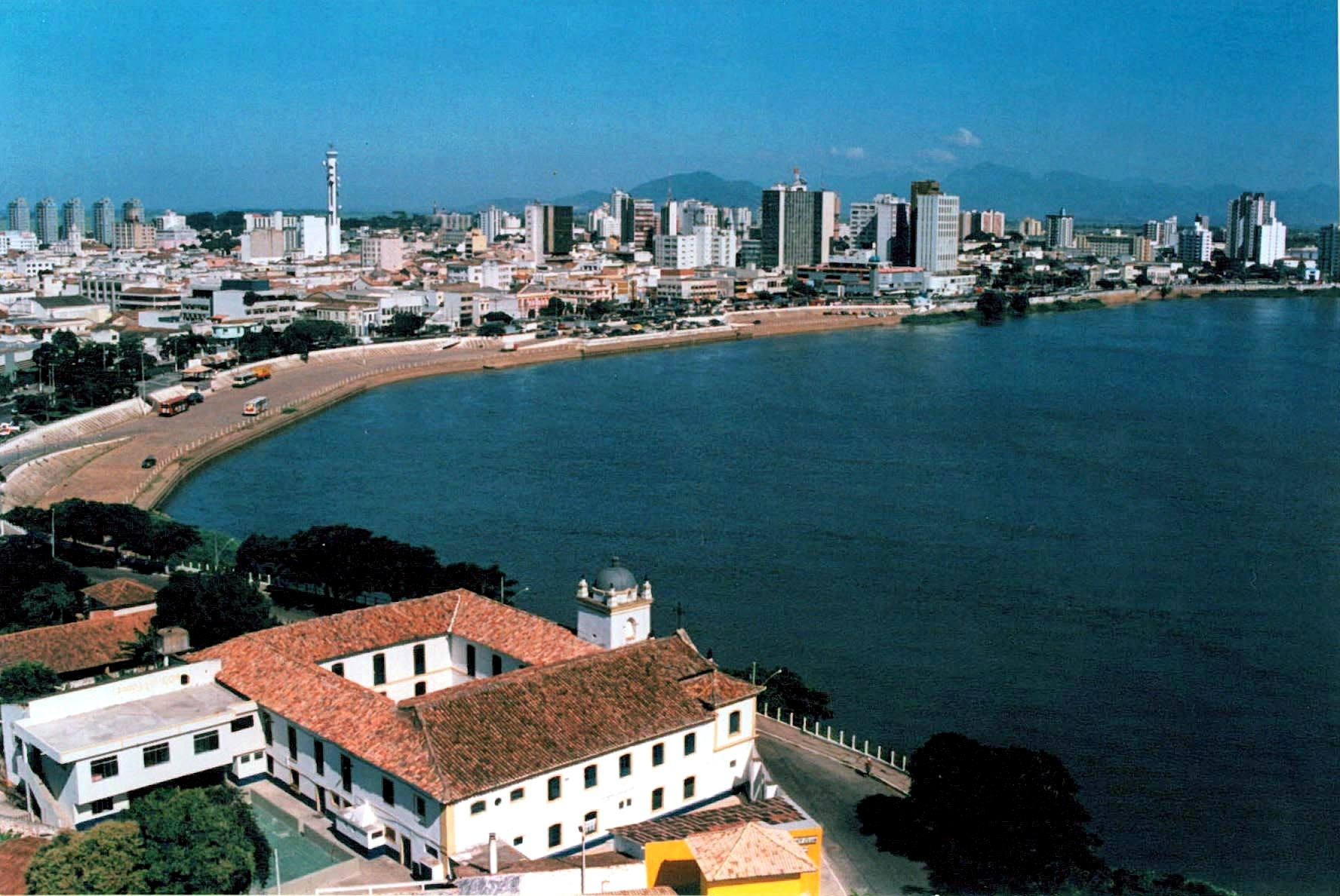 Campos dos Goytacazes City, Rio de Janeiro State